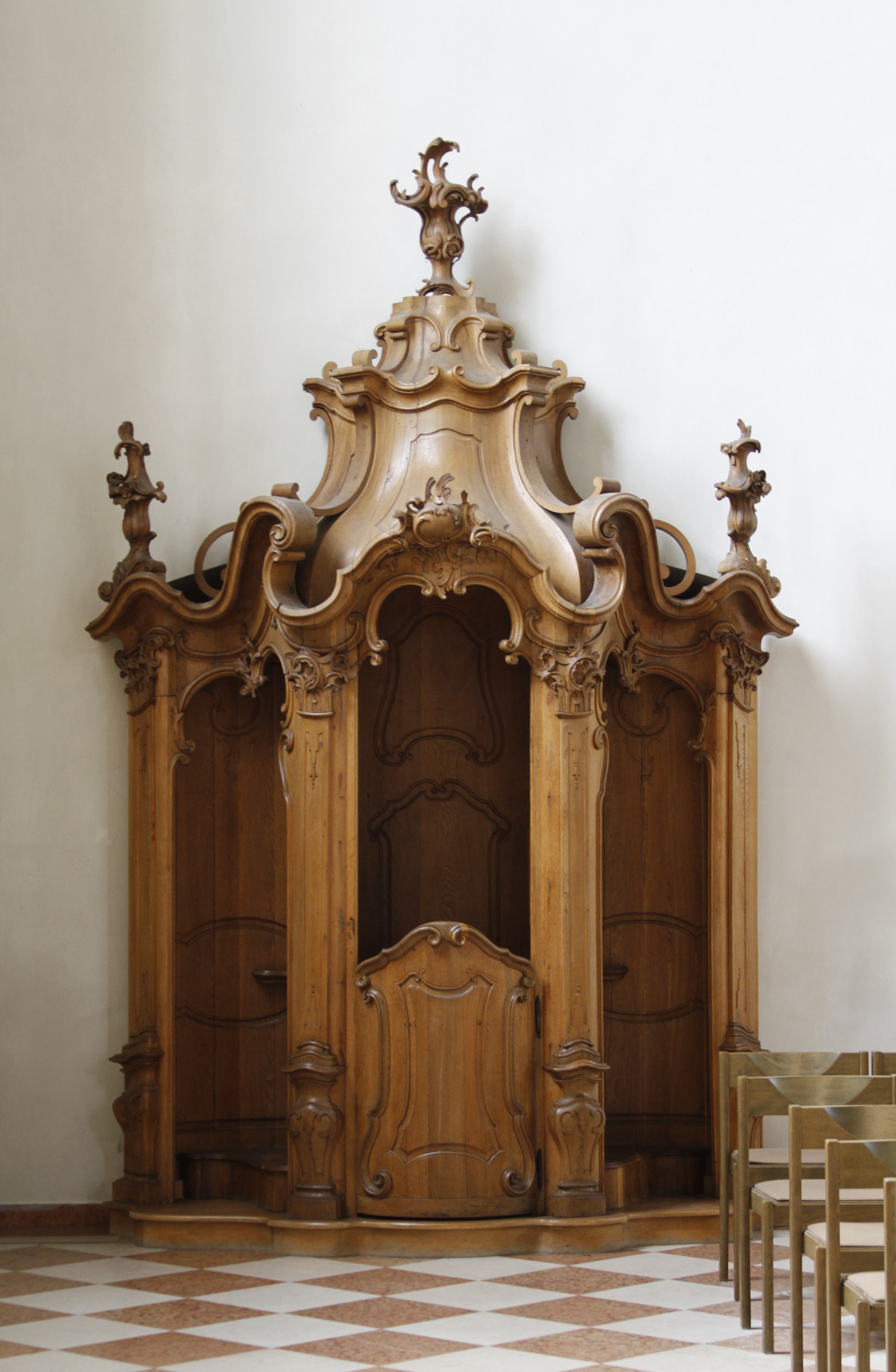 St. Peter - Mainz - Germany